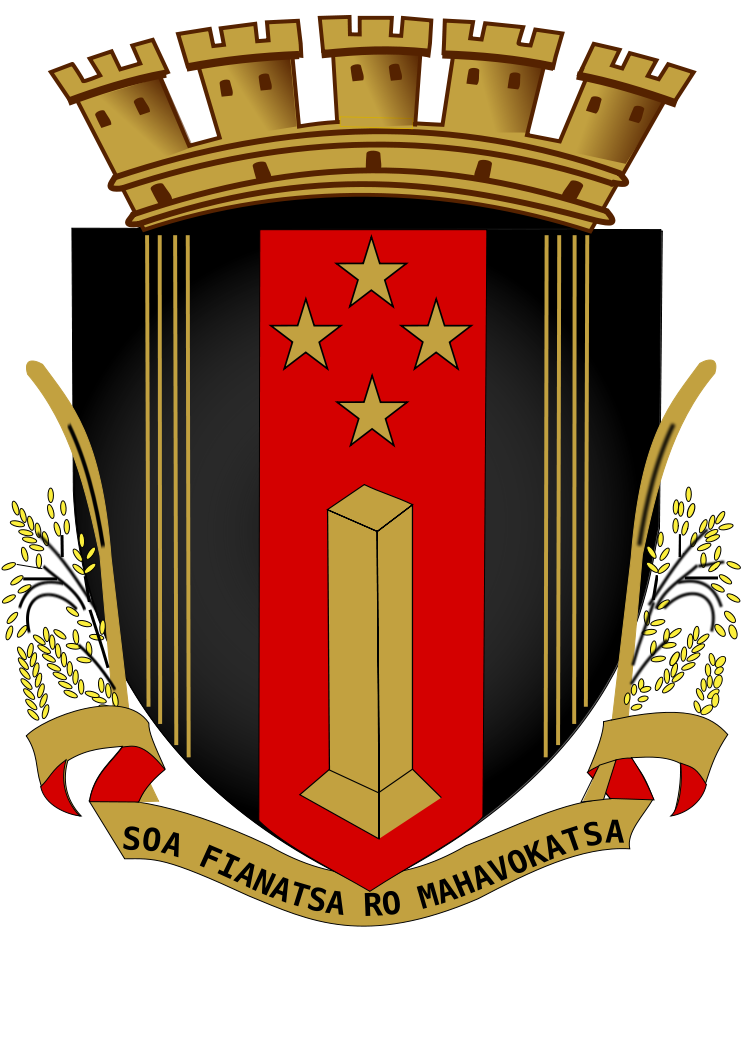 Blason de Fianarantsoa